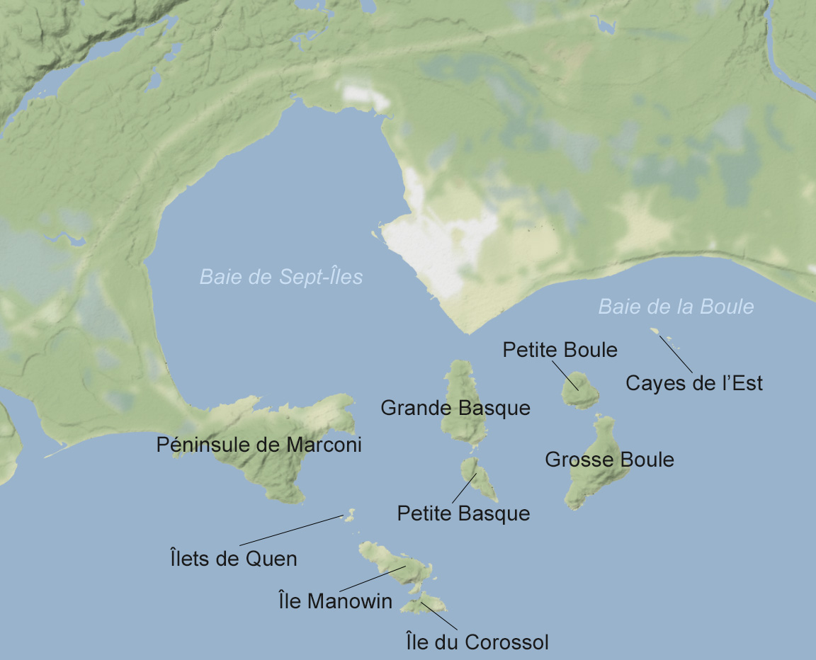 Carte de l'Archipel des Sept-Îles